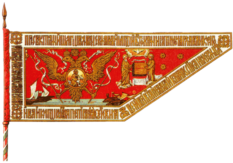 Гербовое знамя 1696 г. Одно из первых знамен Петра I 1696 года, в традициях предков.